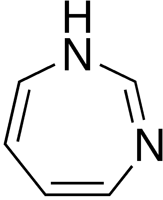 chemical structure of 1,3-diazepine